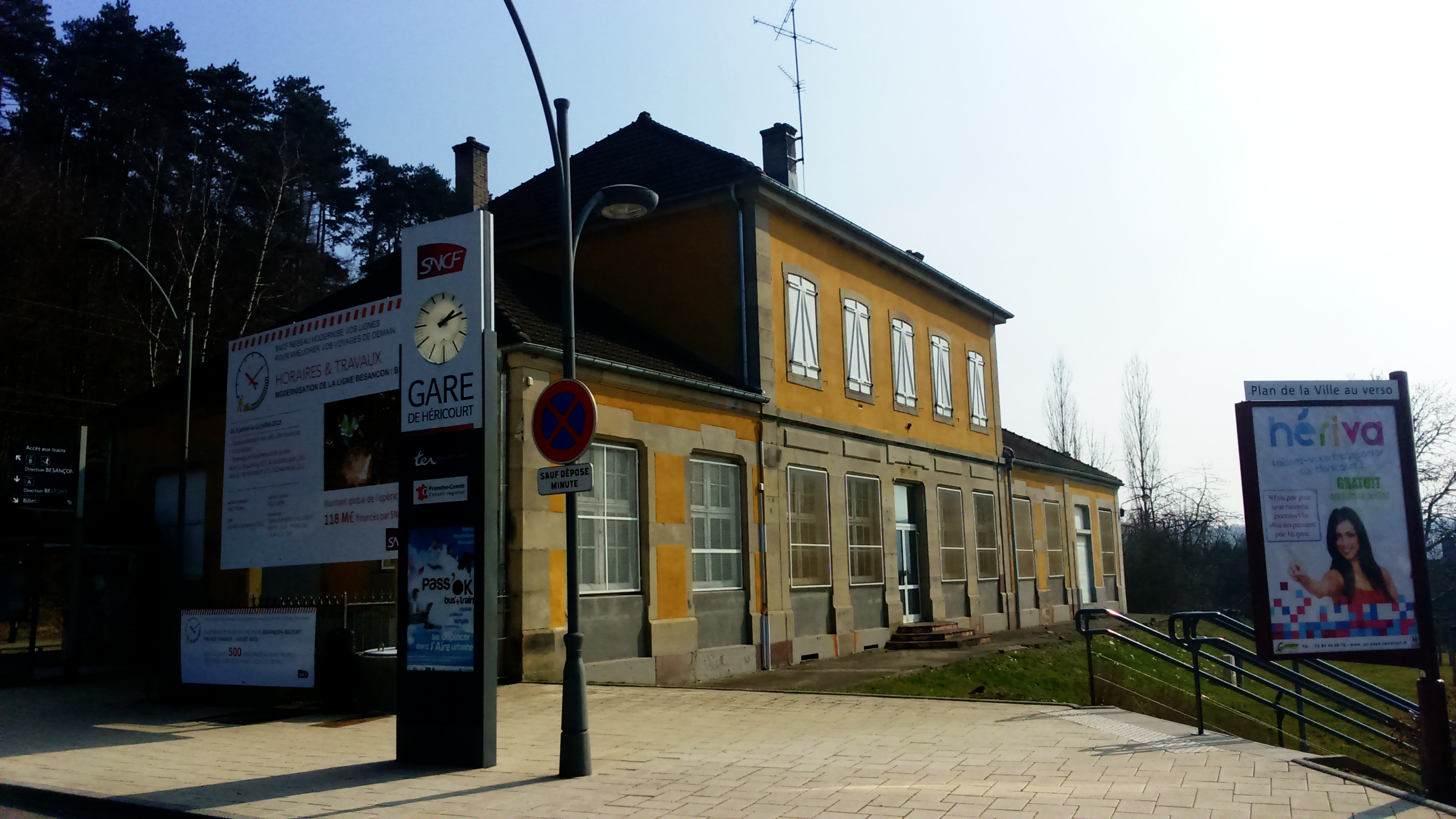 Gare d'Héricourt, Haute Saone, France